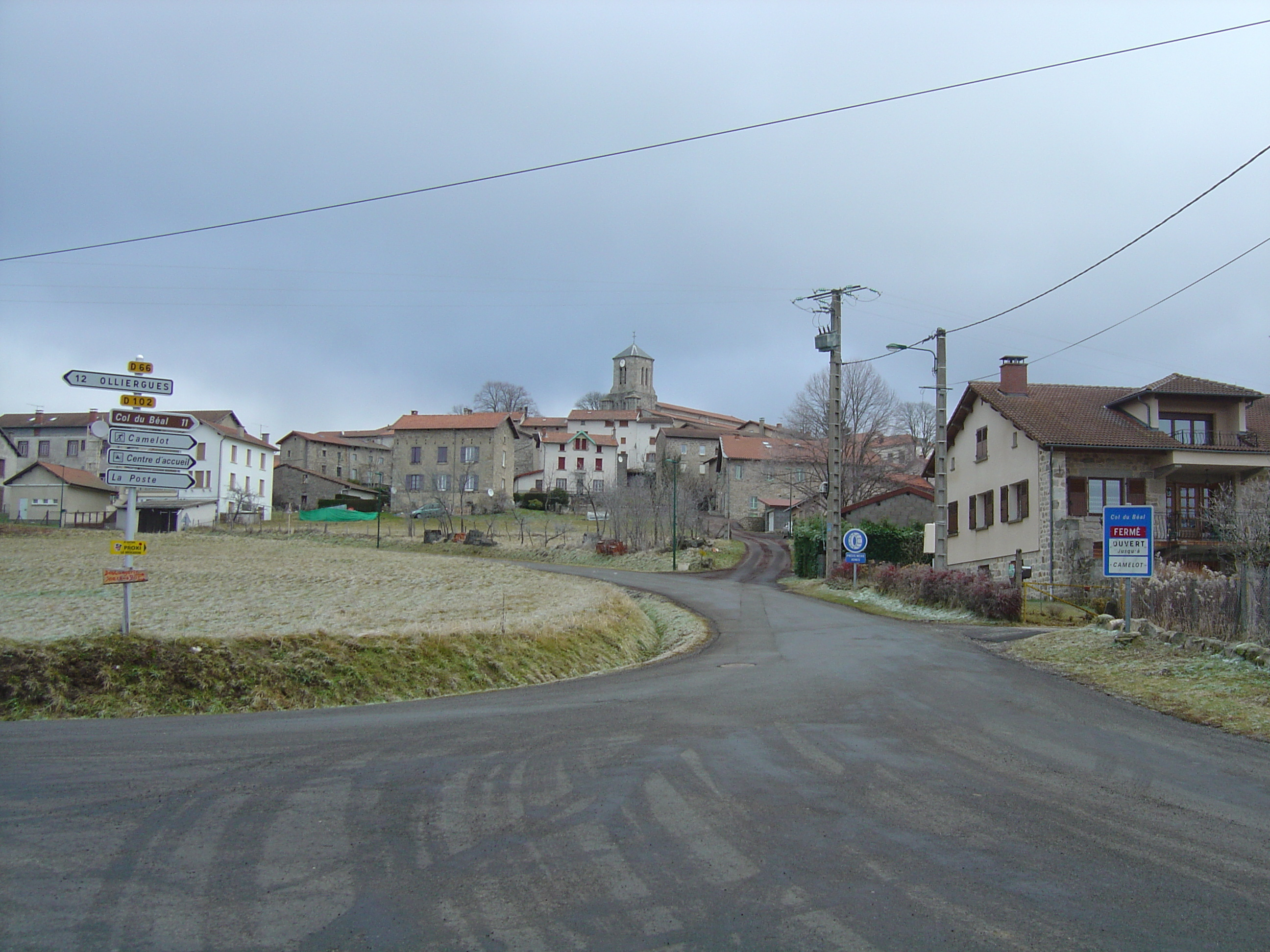 Village du Brugeron (Puy-de-Dôme; 63; Haut-Forez)